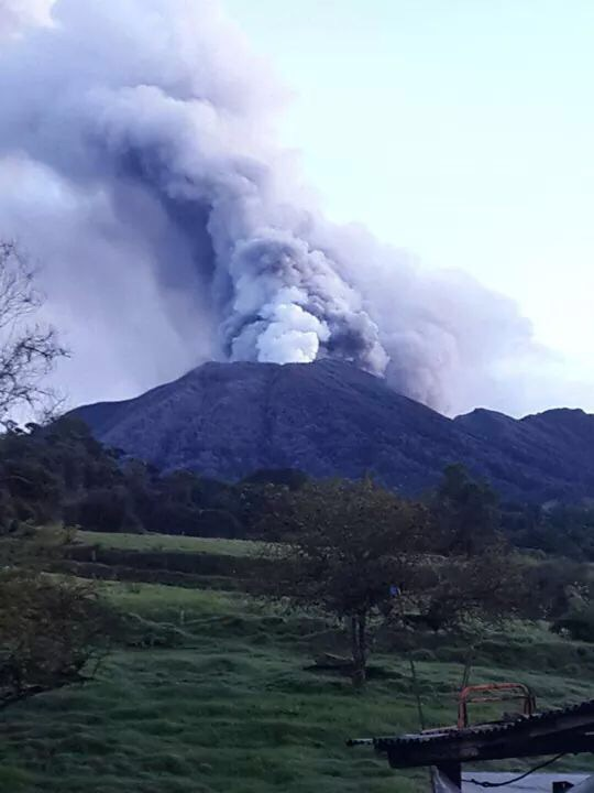 Erupción freática del volcán Turrialba en octubre 2014, Costa Rica.